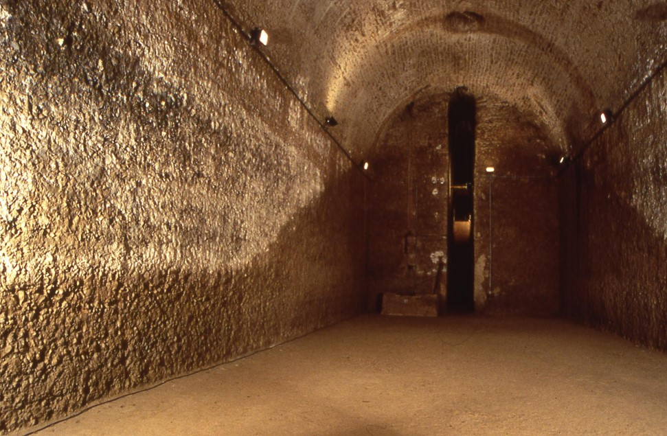 Cisterna romana nel Parco Archeologico di San Vincenzino Cecina